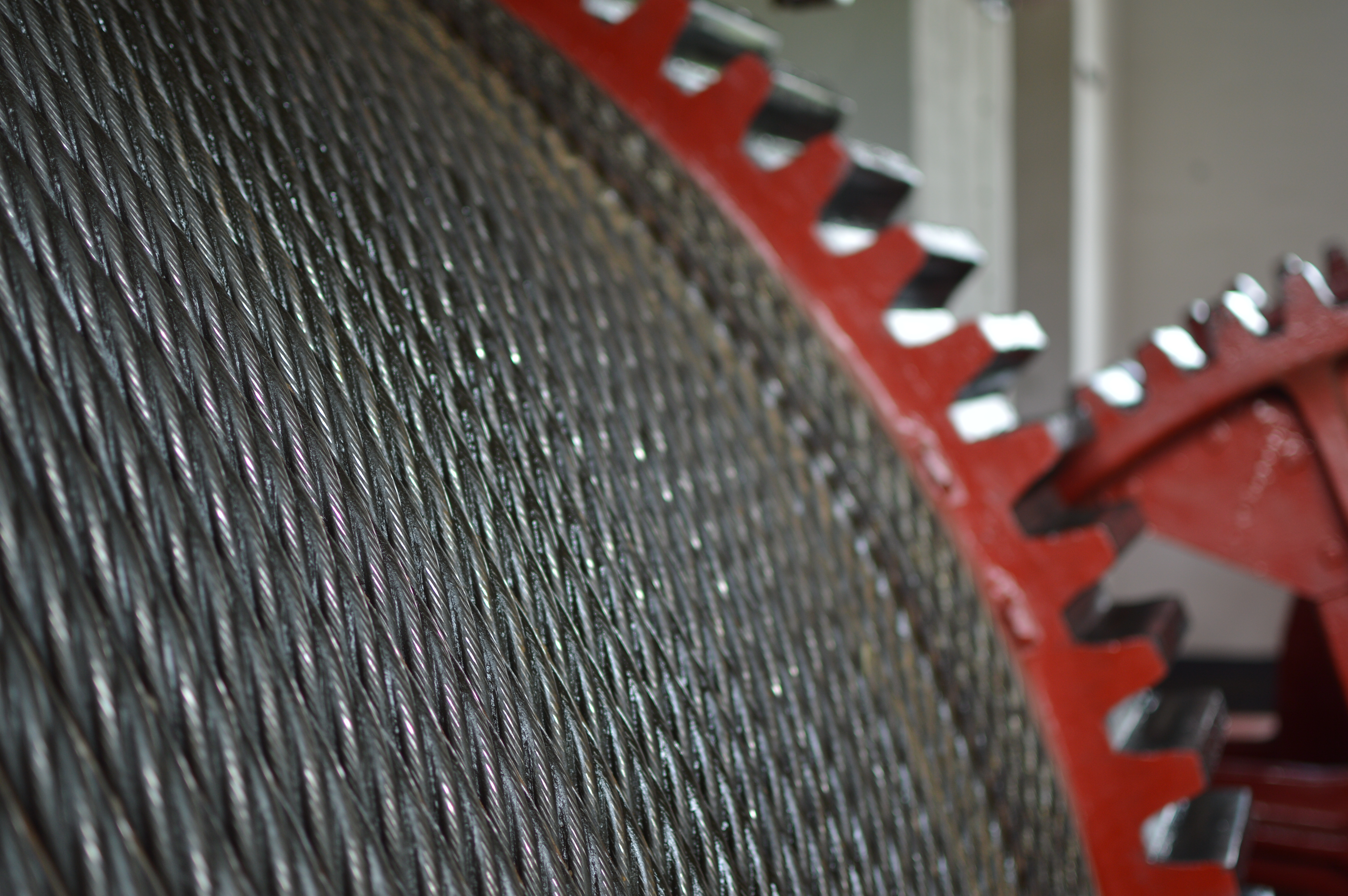 województwo warmińsko-mazurskie, Kanał Elbląski Wikidata has entry Q5637 with data related to this item.